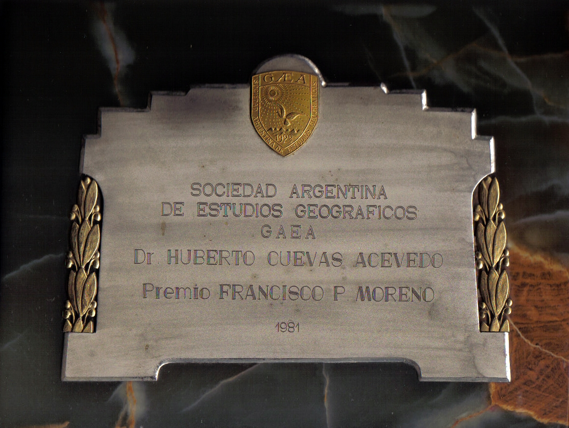 Placa de Onix, grabada en metal, otorgada a Huberto Cuevas Acevedo.